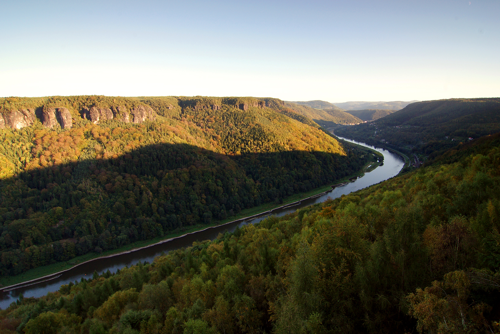 Výhled na Labe z tzv. Labské vyhlídky (poblíž cyklostezky).